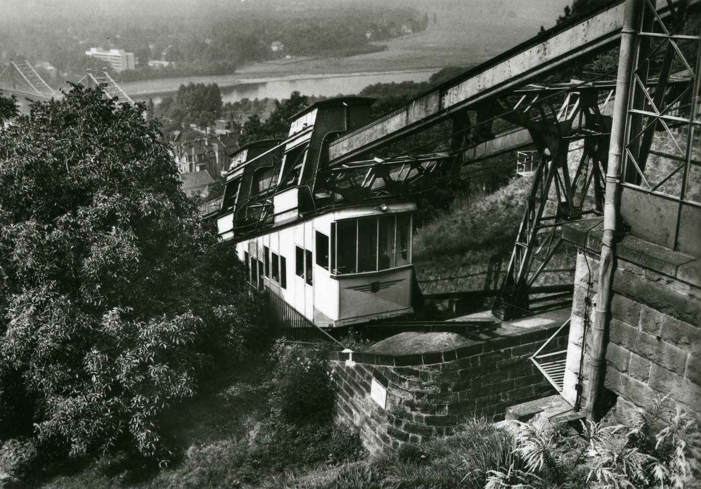 Dresden; Schwebebahn This postcard is from publisher Brück & Sohn in Meißen ( postcard has a unique number 30419 and is available in a higher resolution at the publisher. This images was uploaded in a cooperation project between Wikipedians and the publisher.